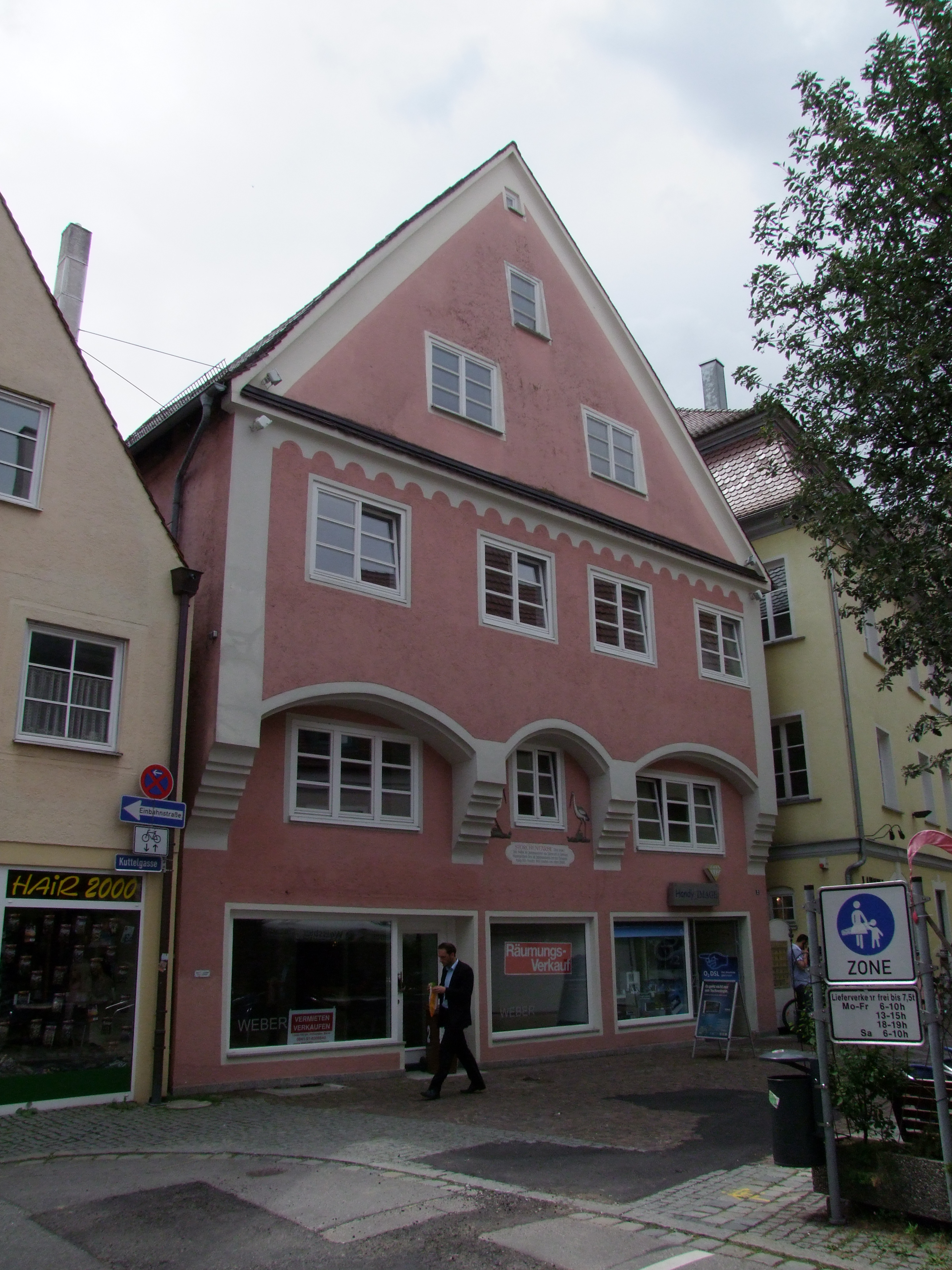 Storchenfärbe